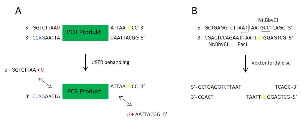 A: USER enzym behandling af PCR produktet. Retningsbestemt kloning er varetaget af unikt overhæng design (blå og gule baser). B: Fordøjelse af vektor DNA med PacI og Nt.BbvCI der danner USER kompatible overhæng.